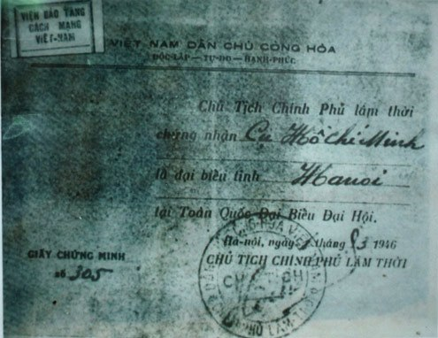 Giấy chứng nhận Chủ tịch Hồ Chí Minh là đại biểu Quốc hội khóa 1, năm 1946 do Chính phủ lâm thời cấp ngày 1/3/1946.